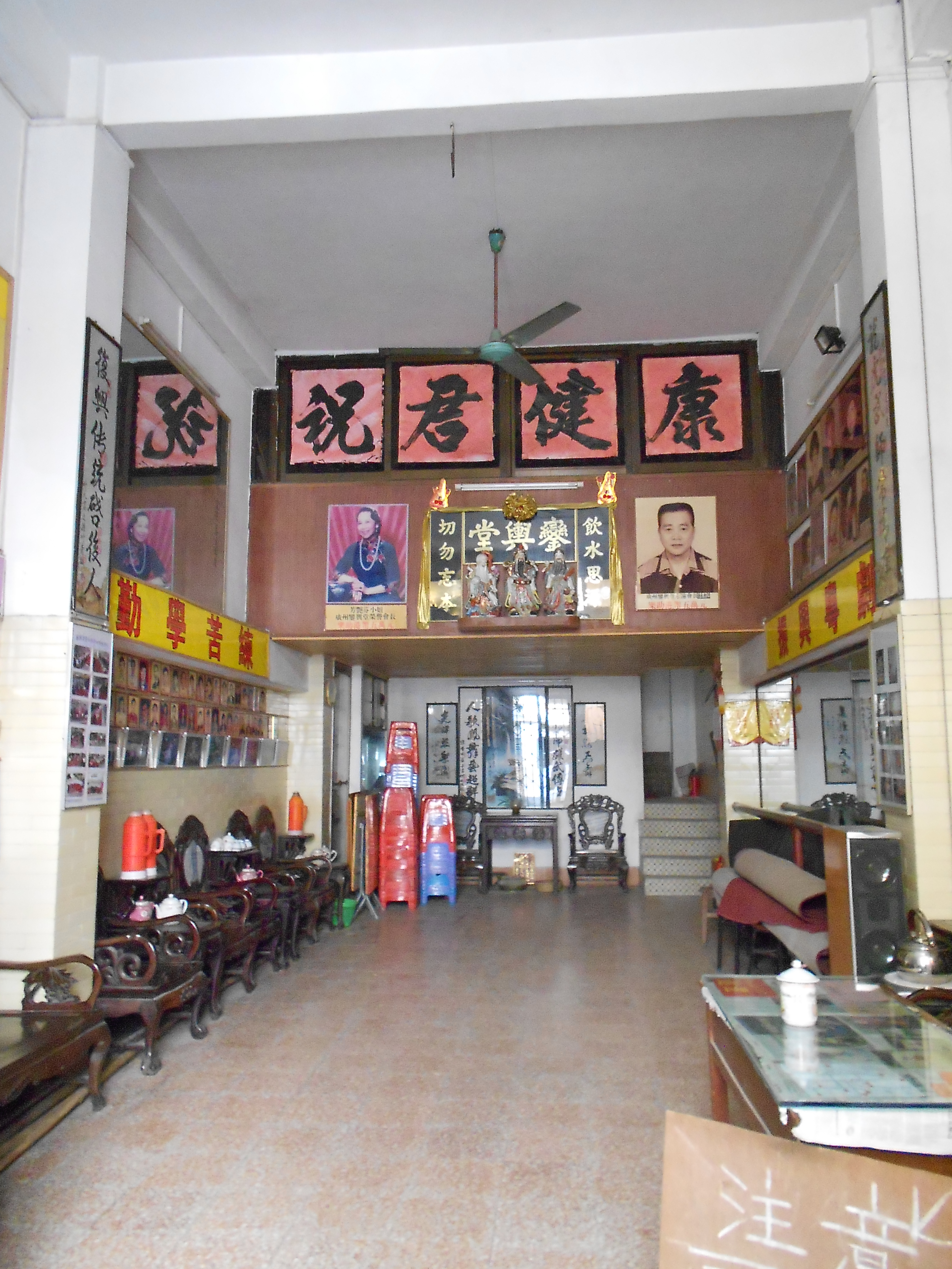 廣州西關恩寧路永慶二巷鑾輿堂內部。